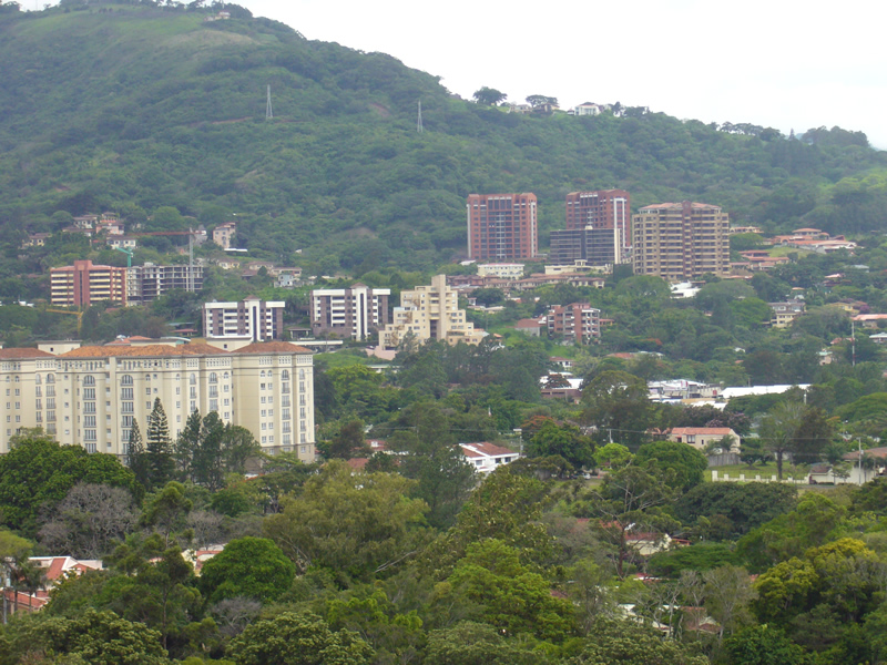 Ciudad Escazu Costa Rica